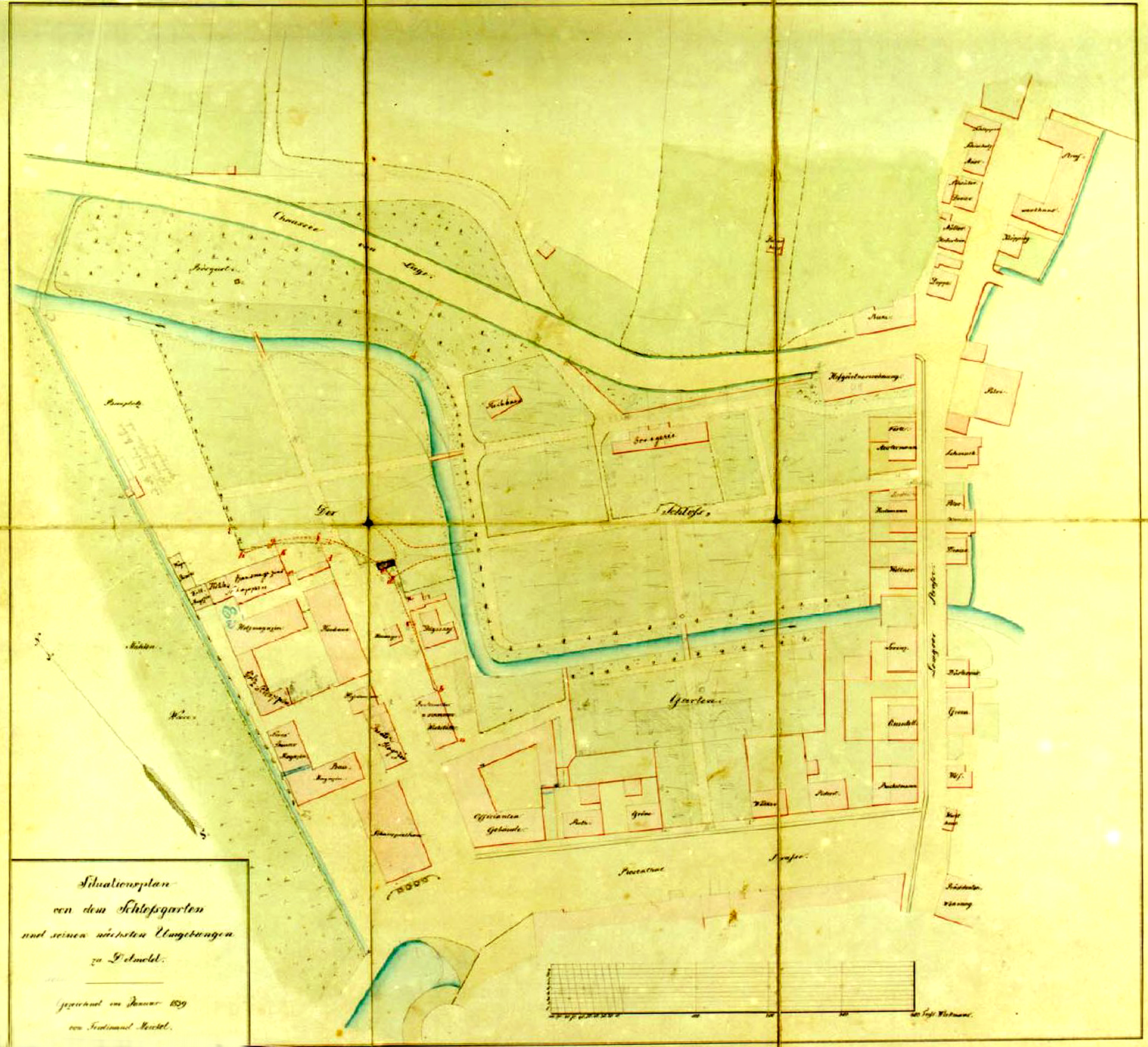 Situationsplan des Schlossgartens in Detmold um 1839 (Heute: Lustgarten)